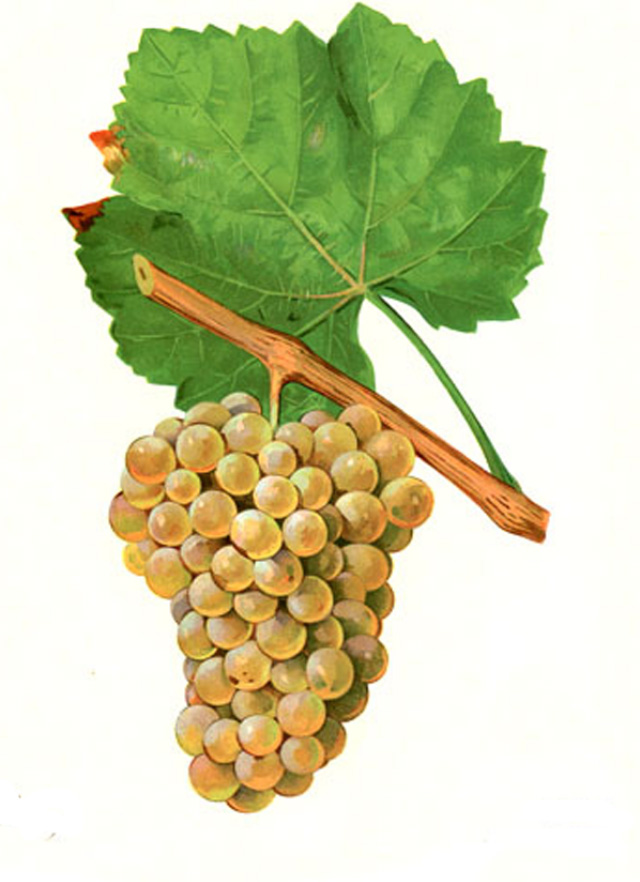 Grappe de Donzellinho branco par Viala et Vermorel